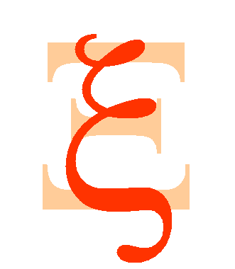 Greek letter